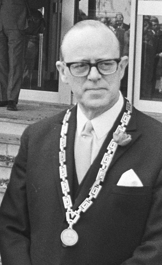 Vooraan v.l.n.r. Coenen (voorzitter Koninklijke Algemene Vereniging voor bloembollencultuur), prins Bernhard, burgemeester Van Niekerk van Hillegom